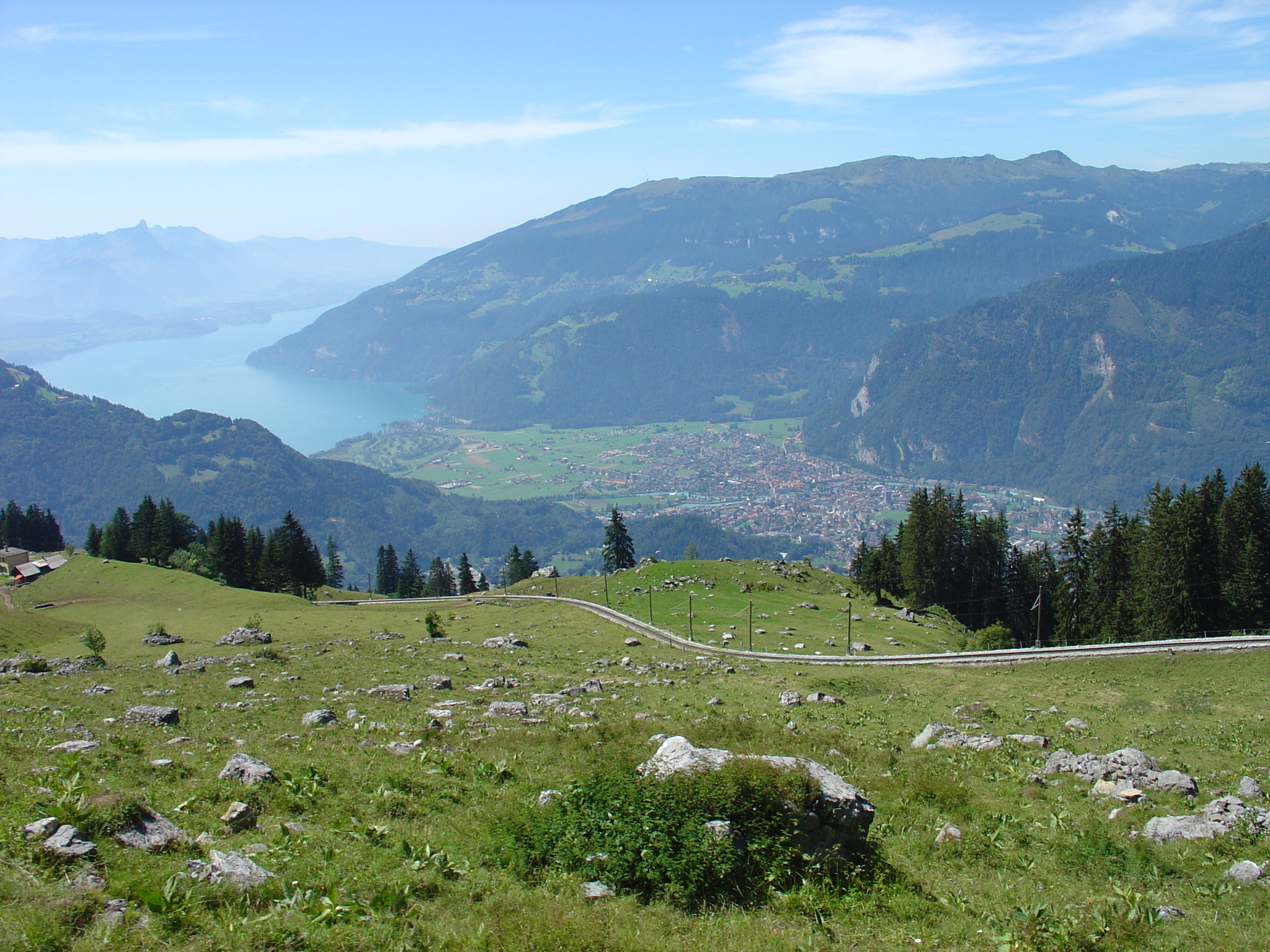 View of Interlaken from Schynige Platte-Bahn (SPB)